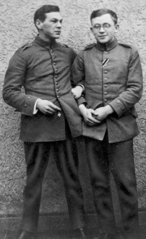 ADN-ZB/19.5.1981/Berlin: Der Präsident des Nationalrates der Nationalen Front der DDR, Prof. Dr. Dr. Erich Correns (r.), mit Dr. Richard Sorge 1915 im Lazarett Berlin-Lankwitz. "Dr. Richard Sorge, der als Kundschafter der Sowjetunion hervorragendes geleistet hat, war mein persönlicher Freund. In den Jahren des ersten Weltkrieges und danach haben wir oft über die Zukunft diskutiert und uns gemeinsam ausgemalt, wie es werden könnte, wenn dieses furchtbare Völkermorden zu Ende ginge...Wenn mein Freund Richard Sorge heute hier mit mir an dieser Stelle miterleben könnte, was die Kraft des Volkes nach 1945 vollbracht hat, wie stolz würde er sein, dafür seinen Beitrag geleistet zu haben." Das erklärte Prof. Correns am 6.4.1981 bei seiner Ansprache anläßlich der Auszeichnung des WBA 6 Berlin-Friedrichshain mit dem Vaterländischen Verdienstorden in Gold.